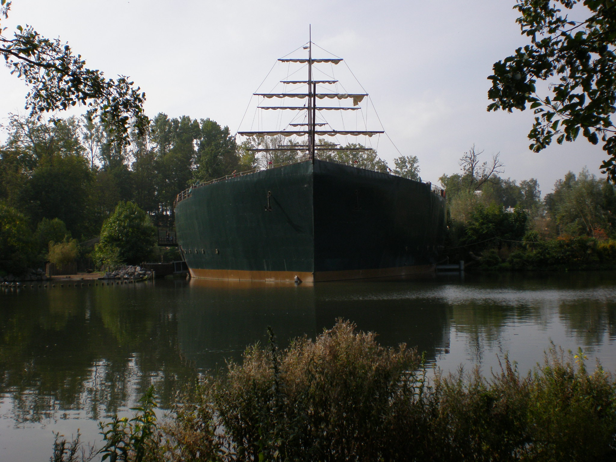 Mersus emergo du Pairi Daiza (Cambron-Casteau, Belgique)